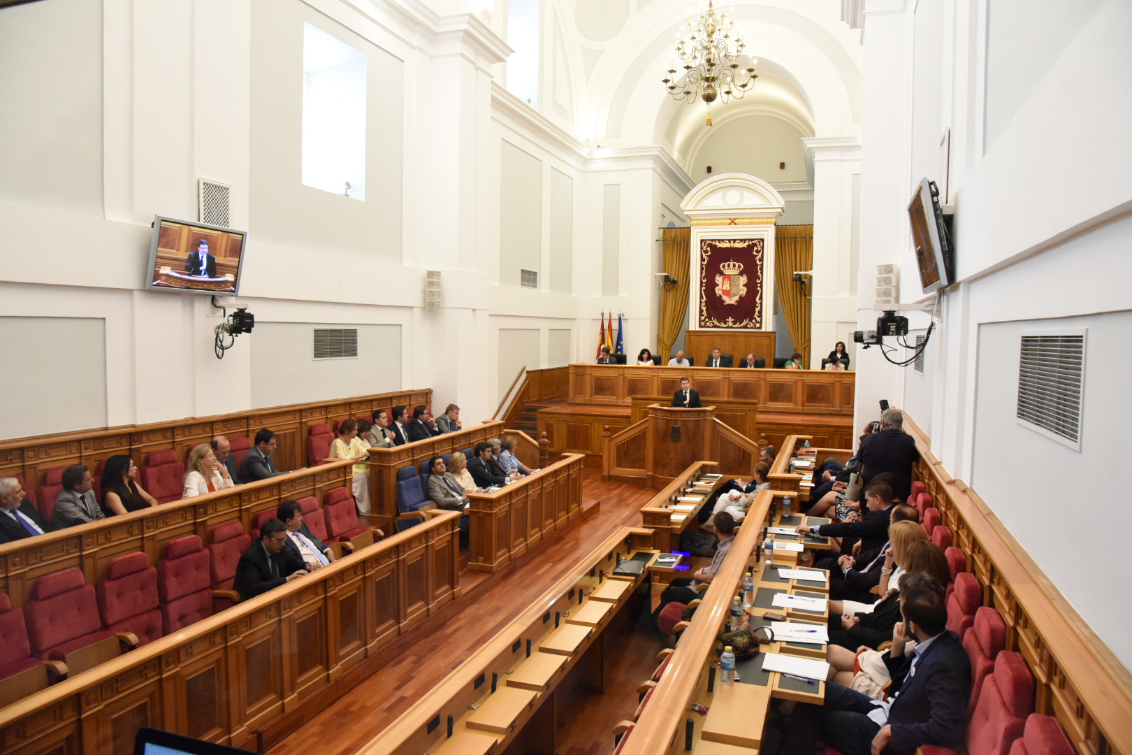 Primera jornada del Debate de Investidura en las Cortes de Castilla-La Mancha